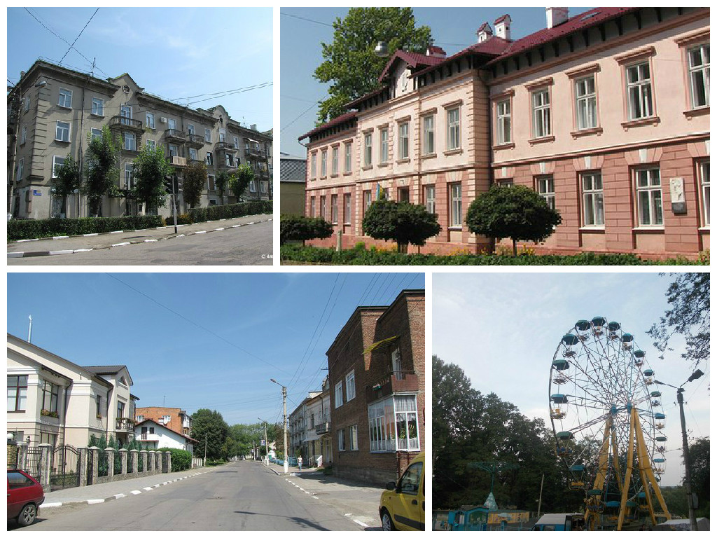 Колаж Калуш